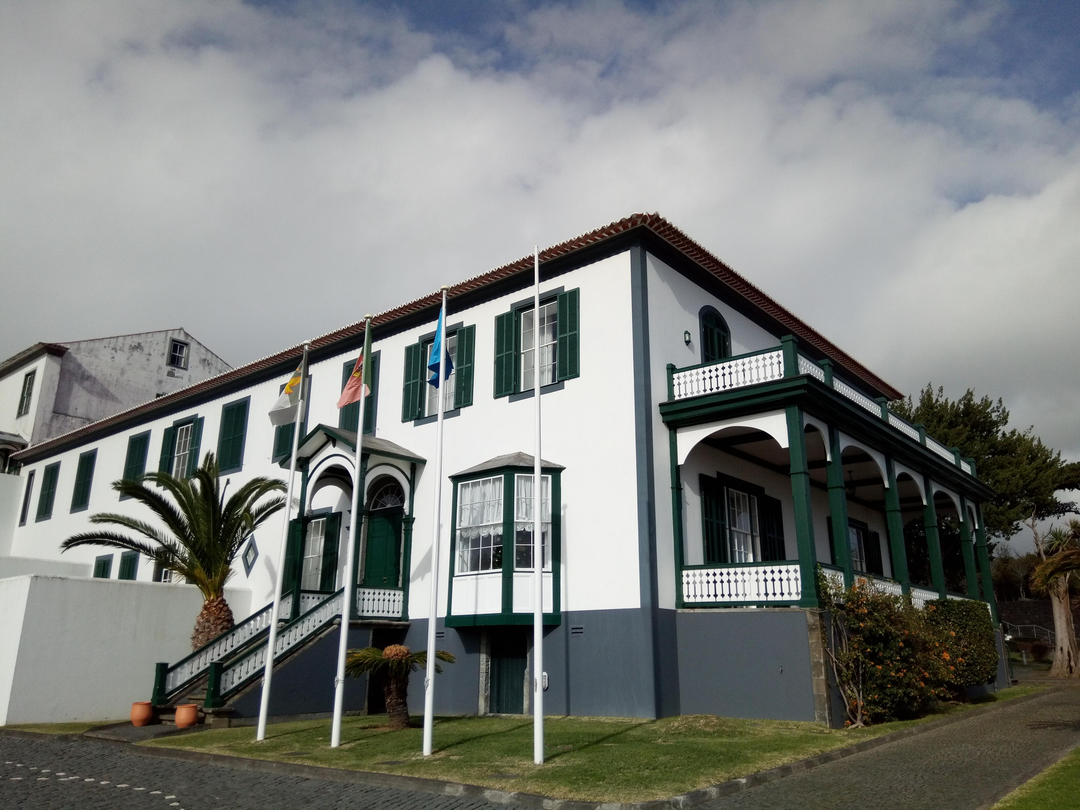 Cedars House, cidade e concelho da Horta, ilha do Faial, Região Autónoma dos Açores, Portugal.